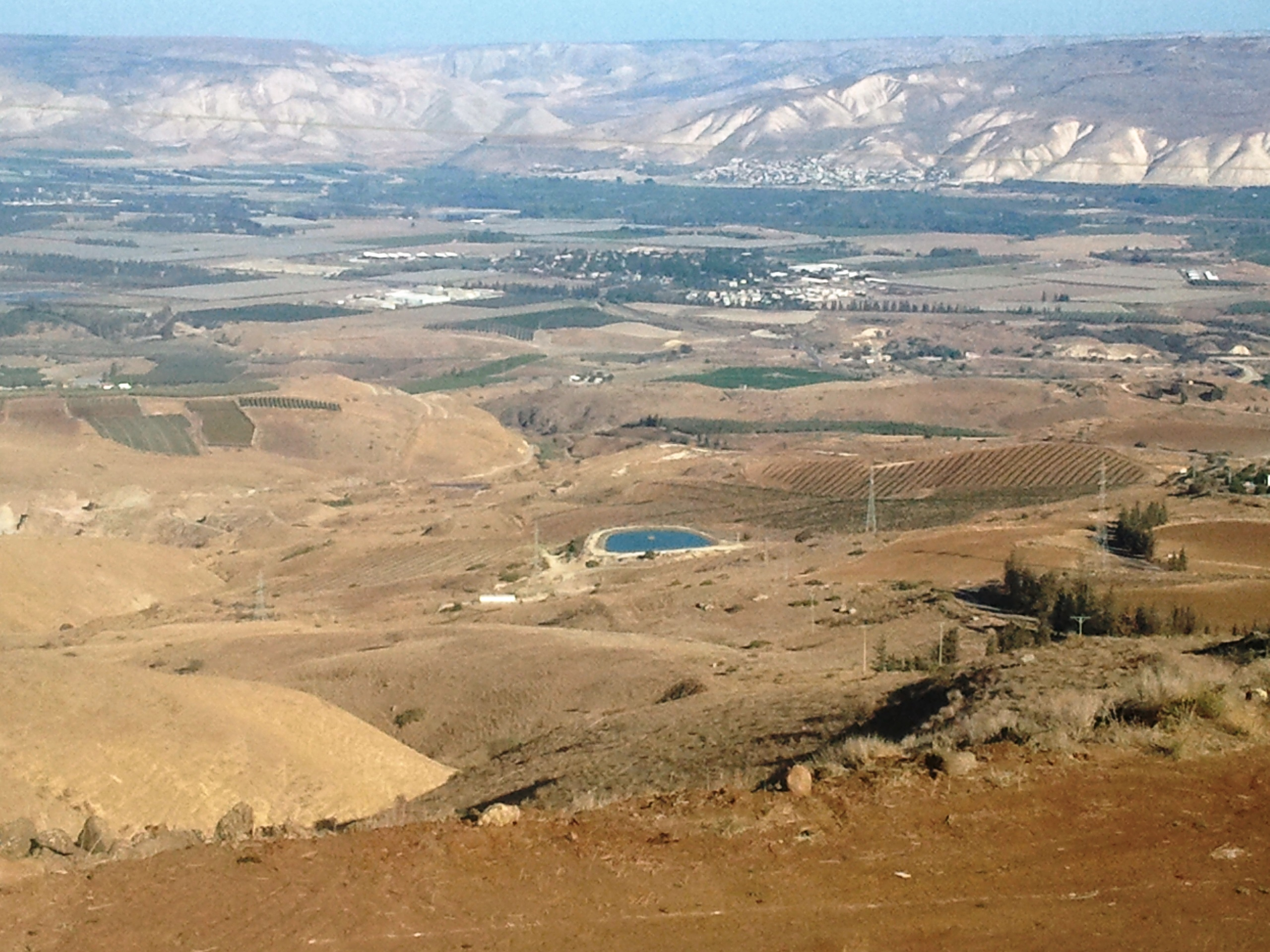 מצפה נח הוא נקודת תצפית הקרויה על שמו של "נח כנרתי" ונמצאת על רמת סירין. ליד נקודת התצפית מאגר מים הקרוי גם הוא על שמו של נח כנרתי עמק הירדן חלקו הדרומי, למטה מאגר מים נוסף